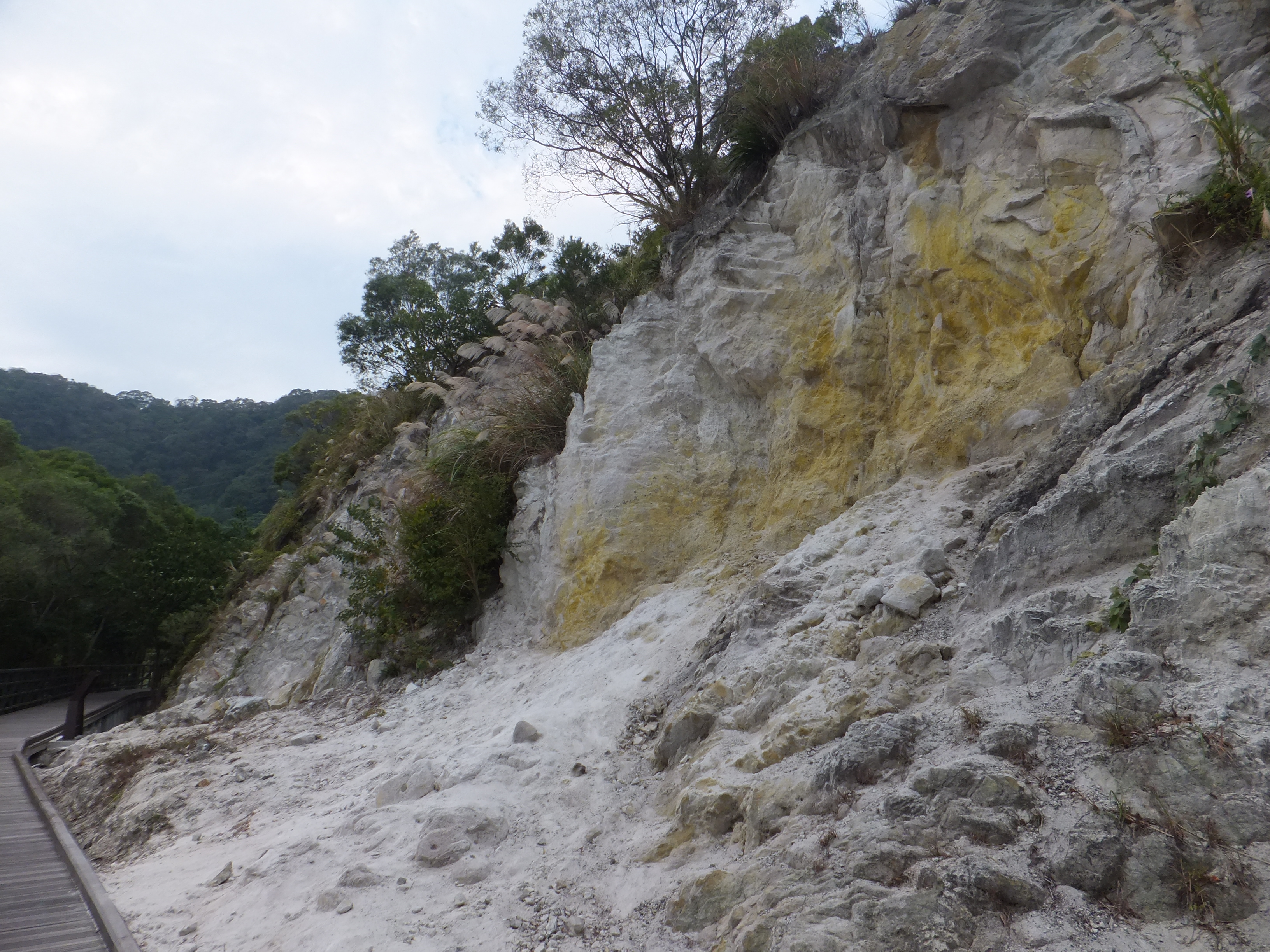 貴子坑岩壁